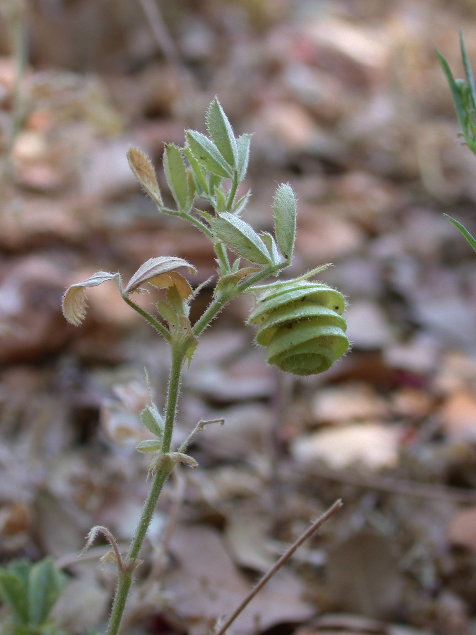 Medicago scutellata (L.) Mill. (אספסת קעורה), Mount Carmel, Israel, May 2, 2008.